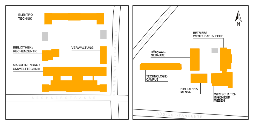 Grundrisse der beiden Hochschulstandorte der OTH Amberg-Weiden